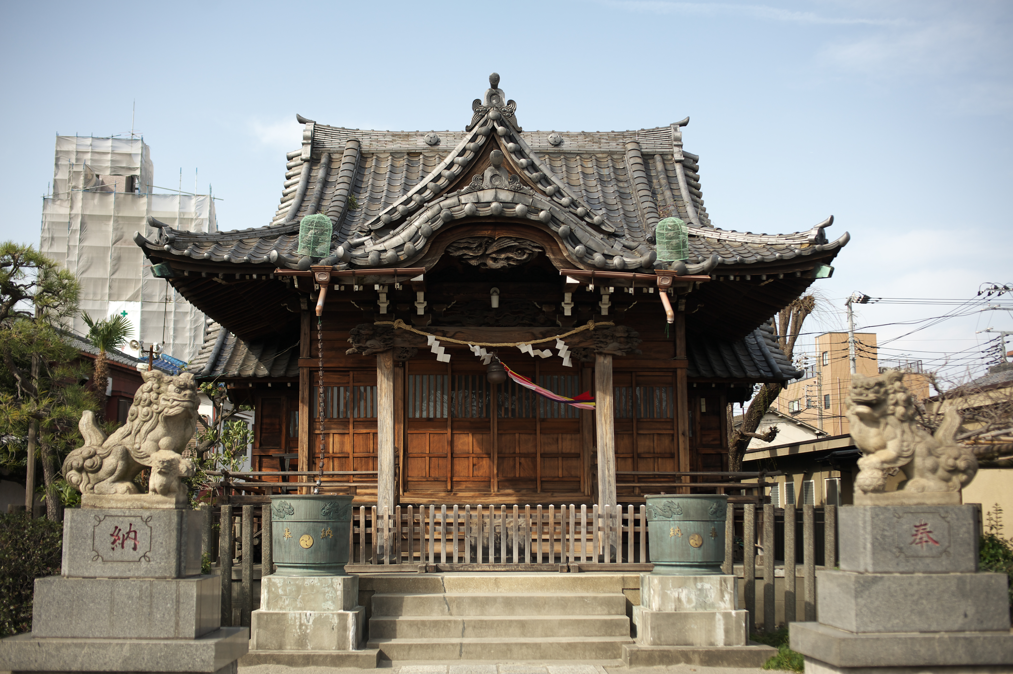 Yasukata jinja Shrine 安方神社